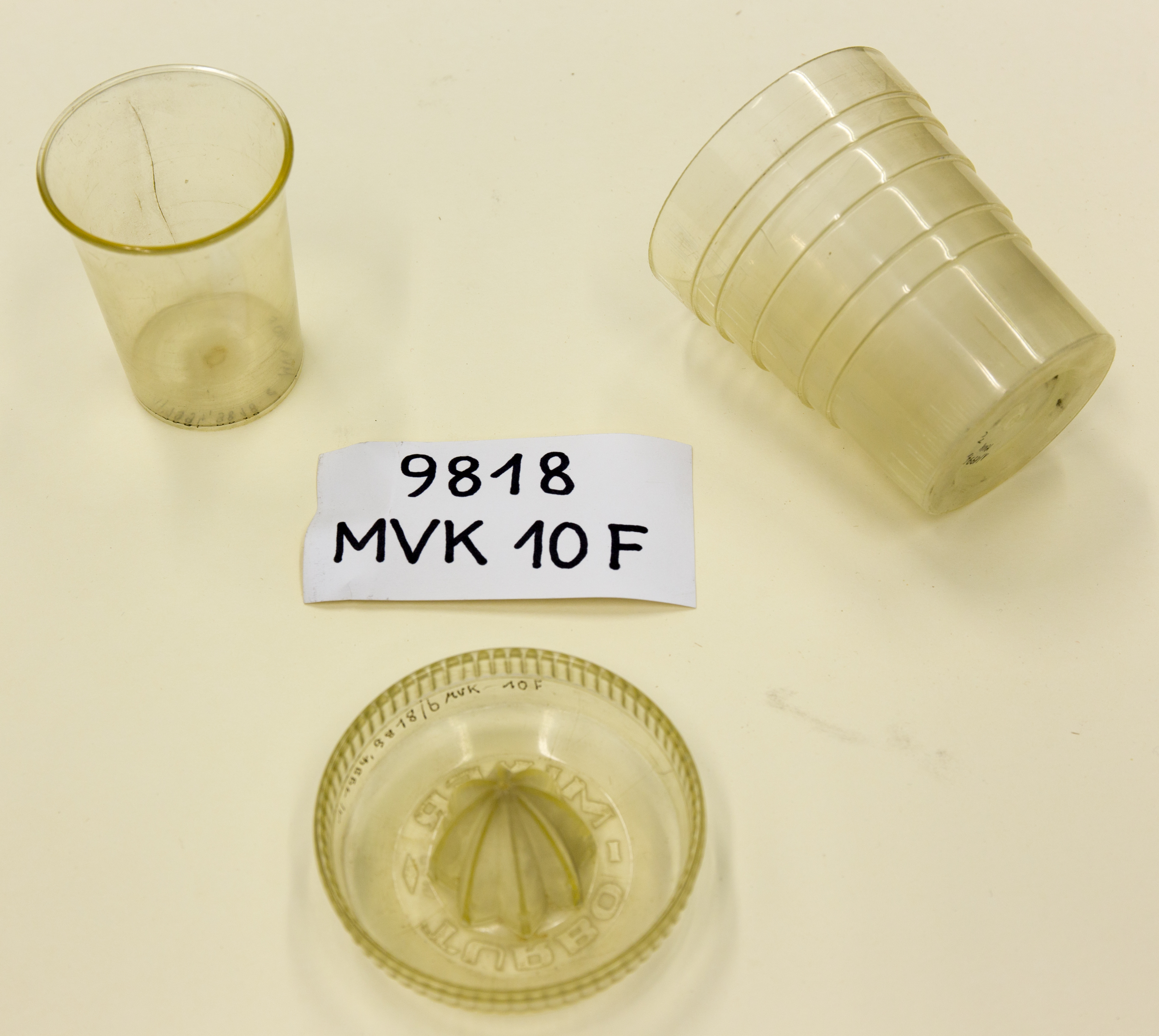 Turbo Mixer, Inventar des MEK